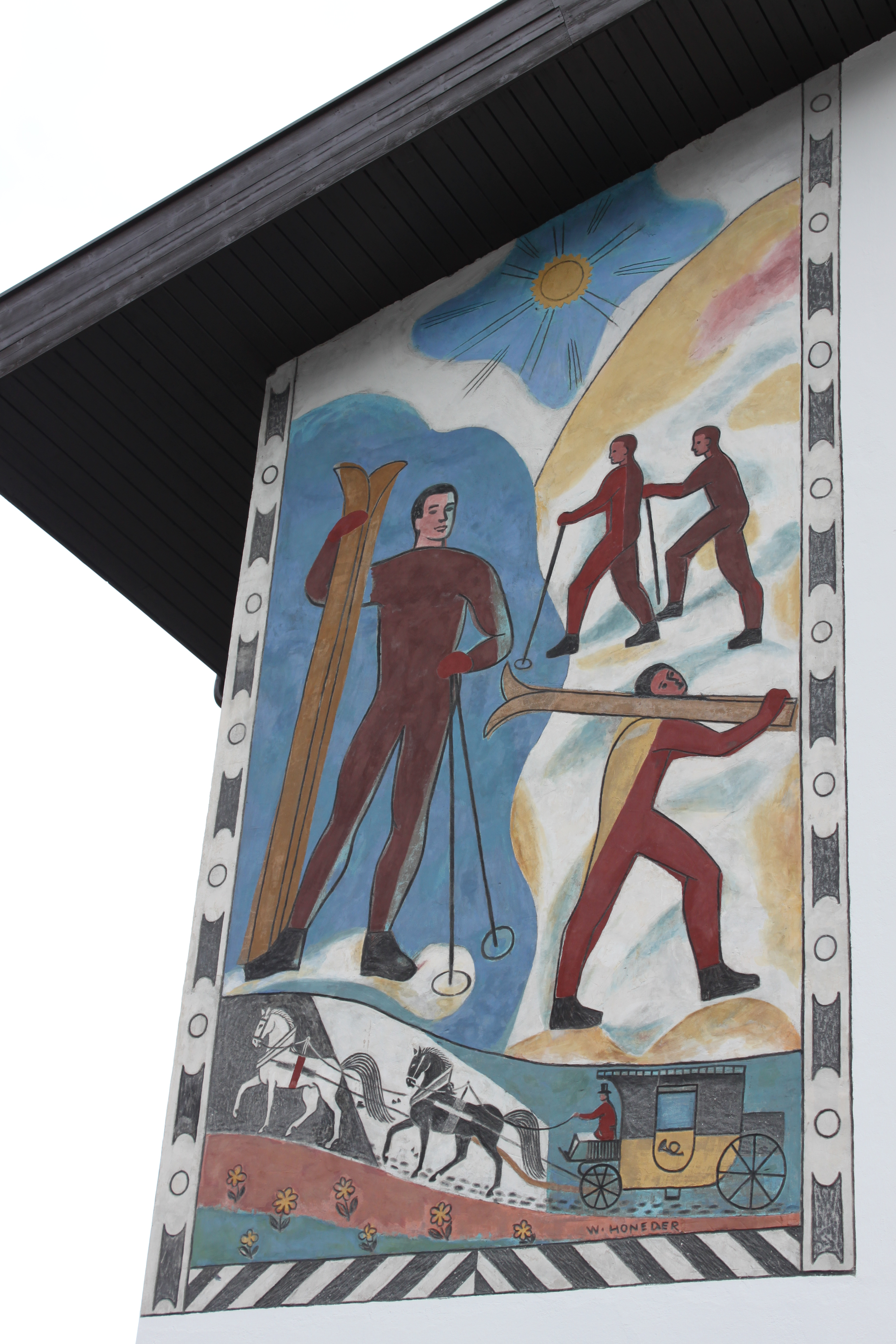 Postamt in Sölden, Fassadenbild vom Maler Walter Honeder, ohne Jahresangabe